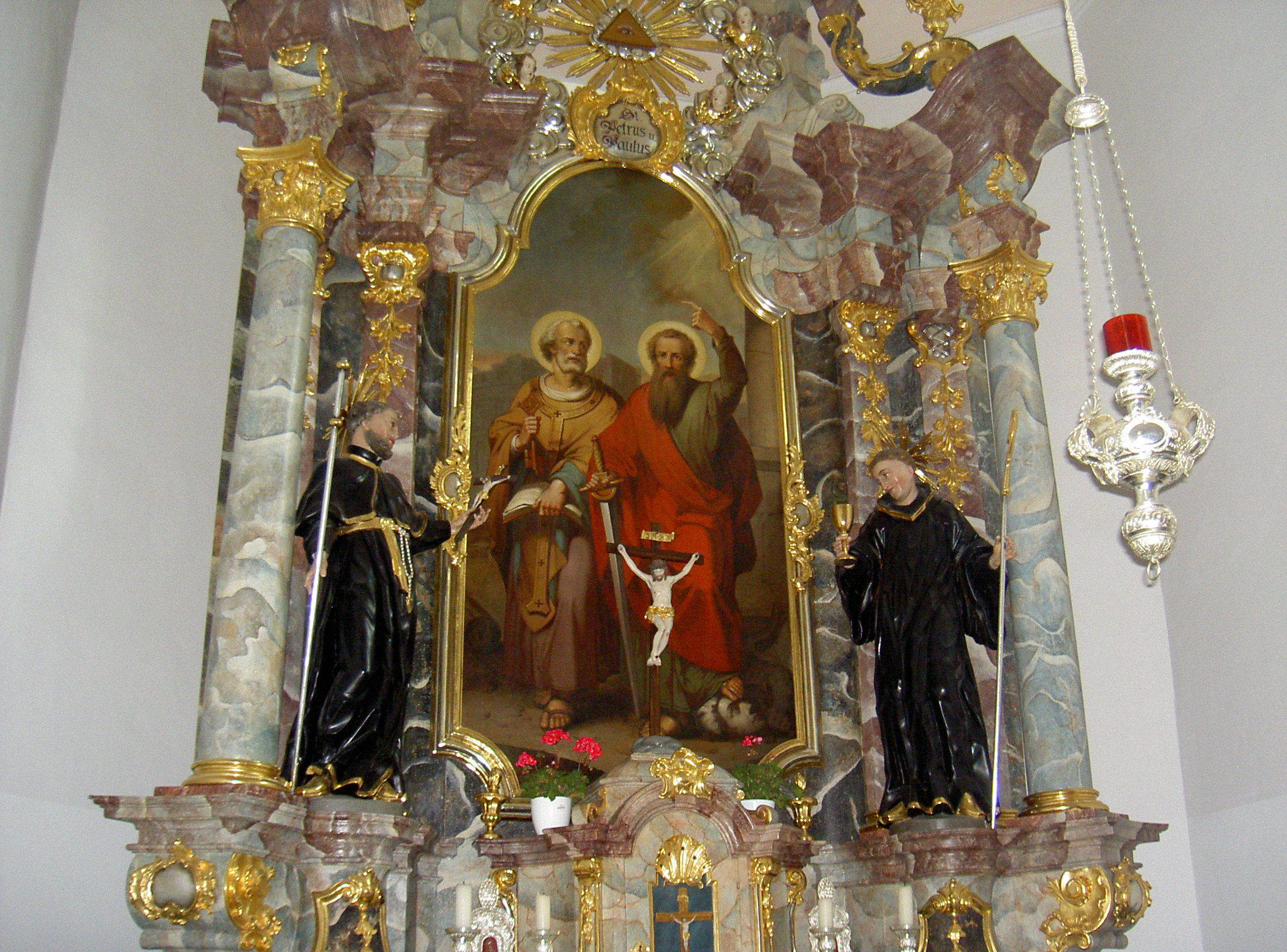 Kirche St. Peter und Paul (Kößing)